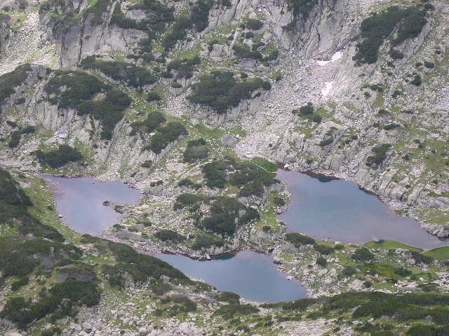 Изработено от Потребител:Lotroo ...